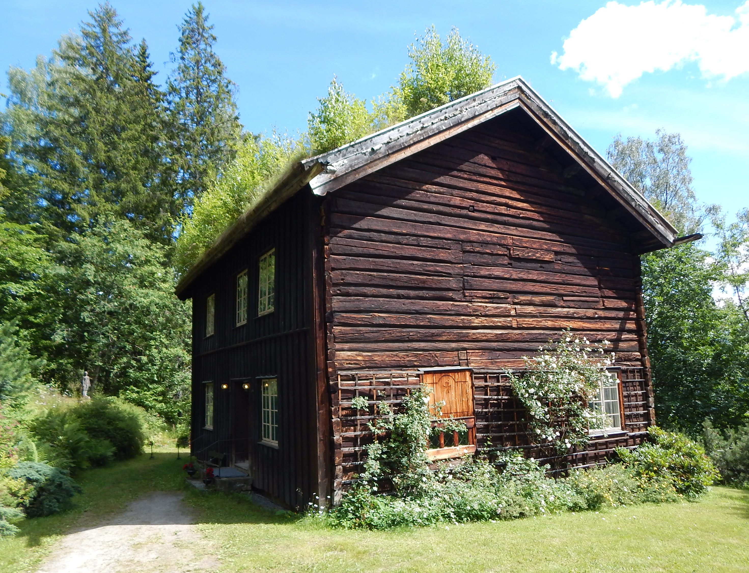 Hjartdal gamle prestegård ved Nutheim gjestgiveri. Prestegårdsbygningen inneholder et kapell.